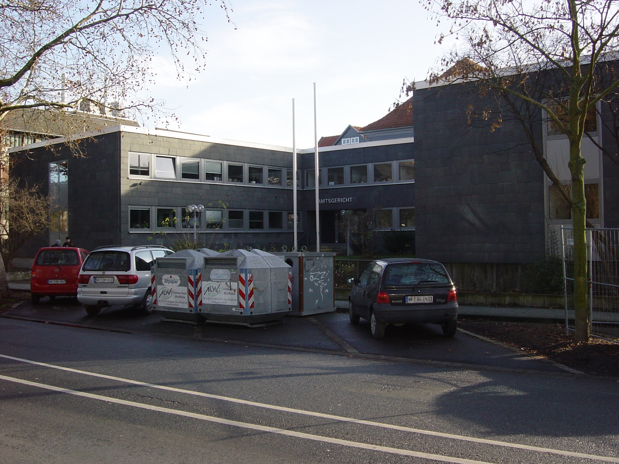 Amtsgericht Wolfenbüttel, Rosenwall 1a, 38300 Wolfenbüttel